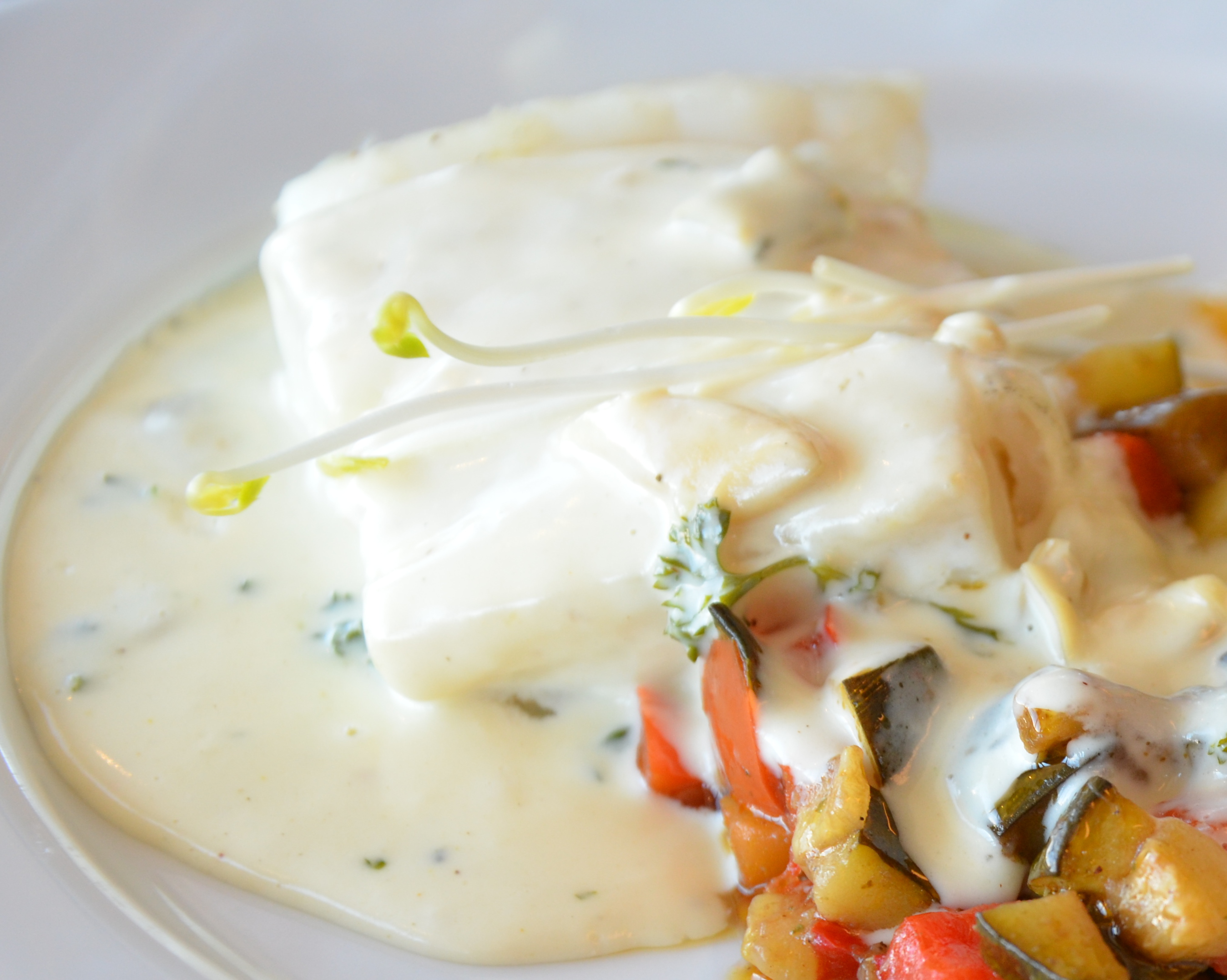 Bourride à la sétoise